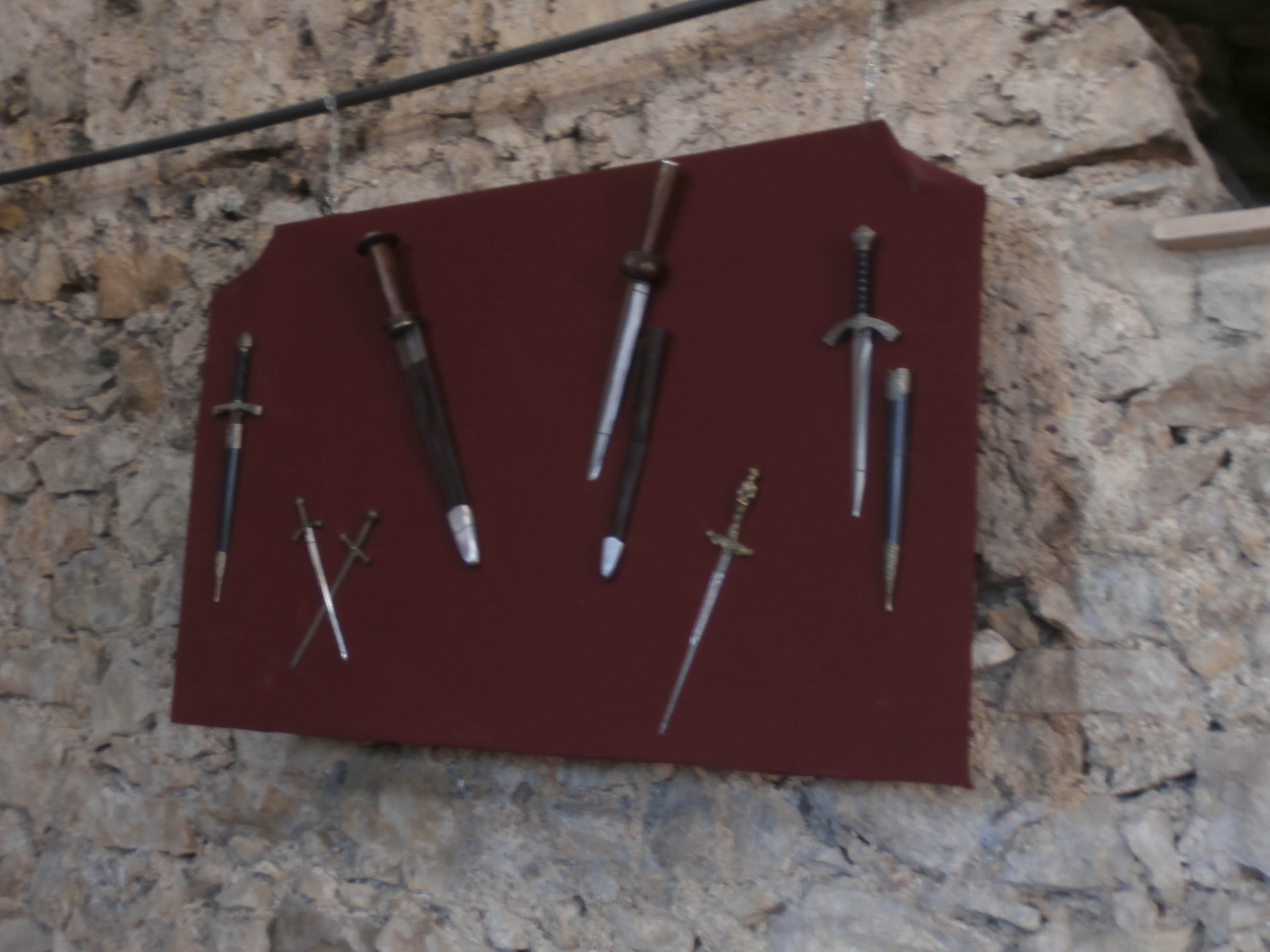 armi da combattimento